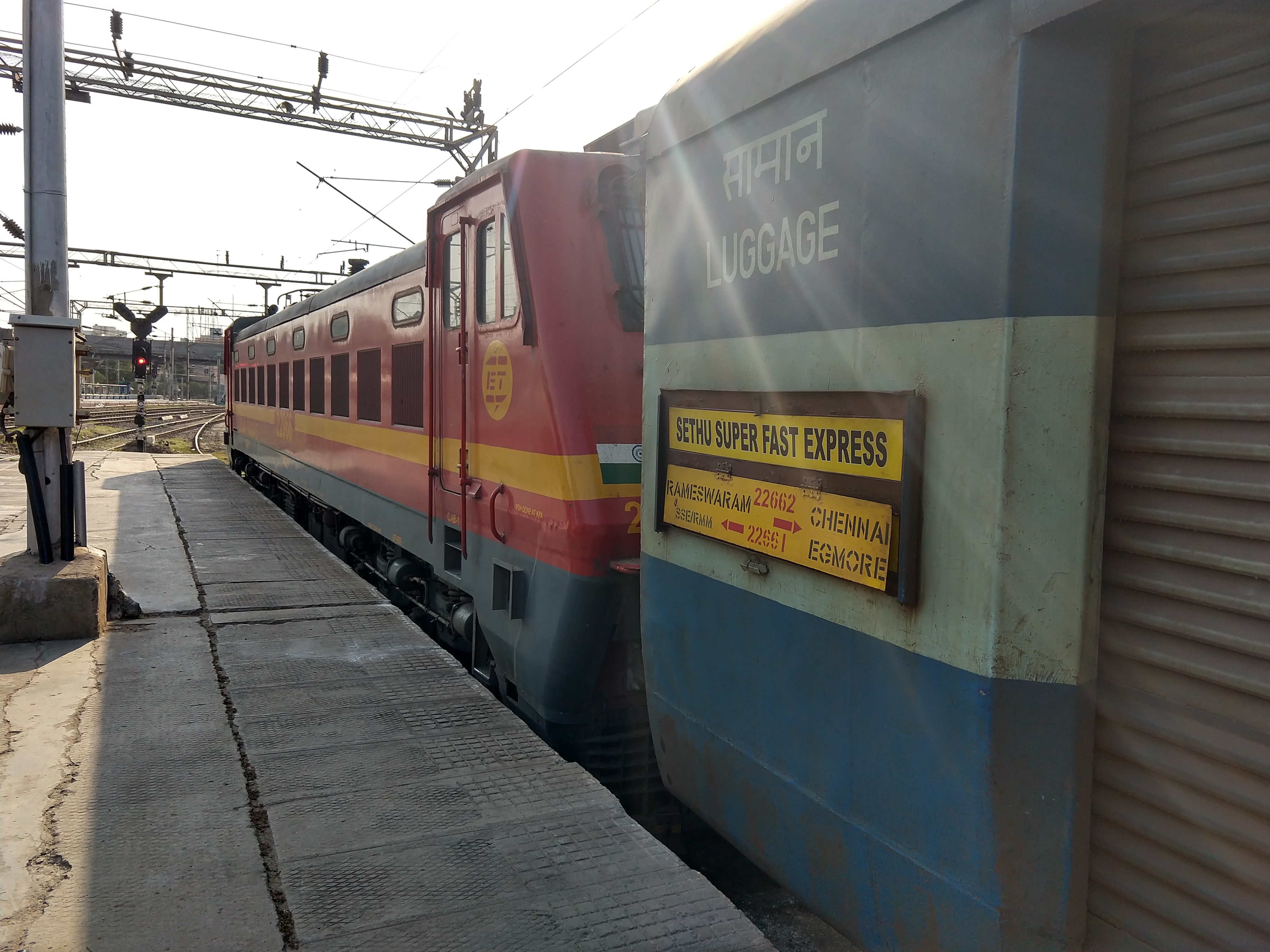 Sethu Super fast Express ready to start from Chennai Egmore, on Platform 9.